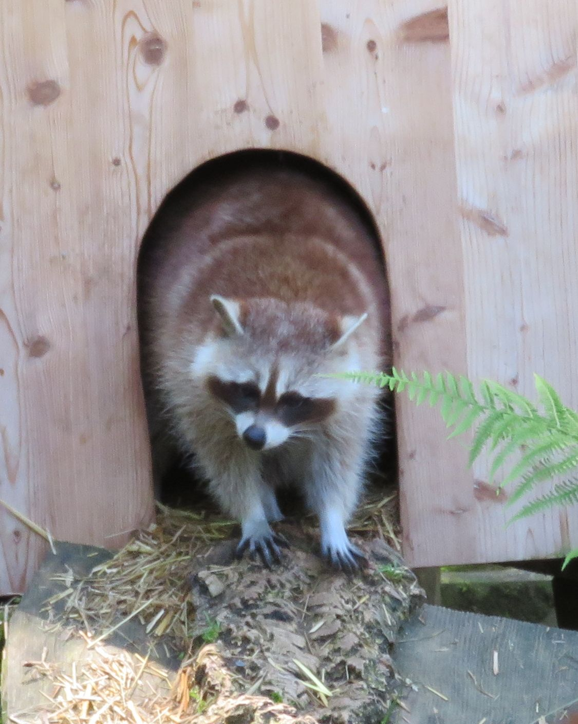 Waschbär im Schwarzwaldzoo Waldkirch